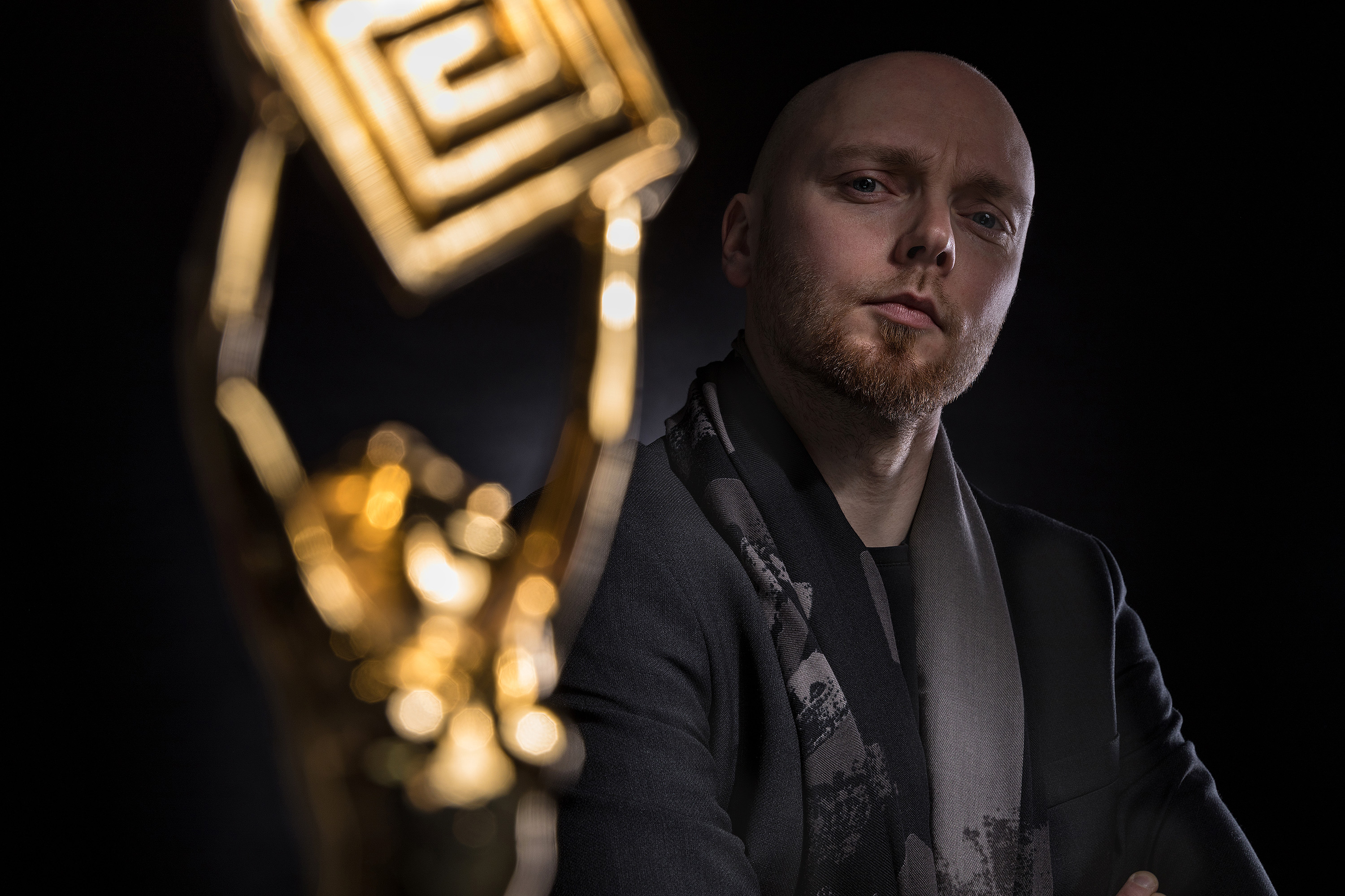 Teemu Hostikka (Photo: Henri Luoma)